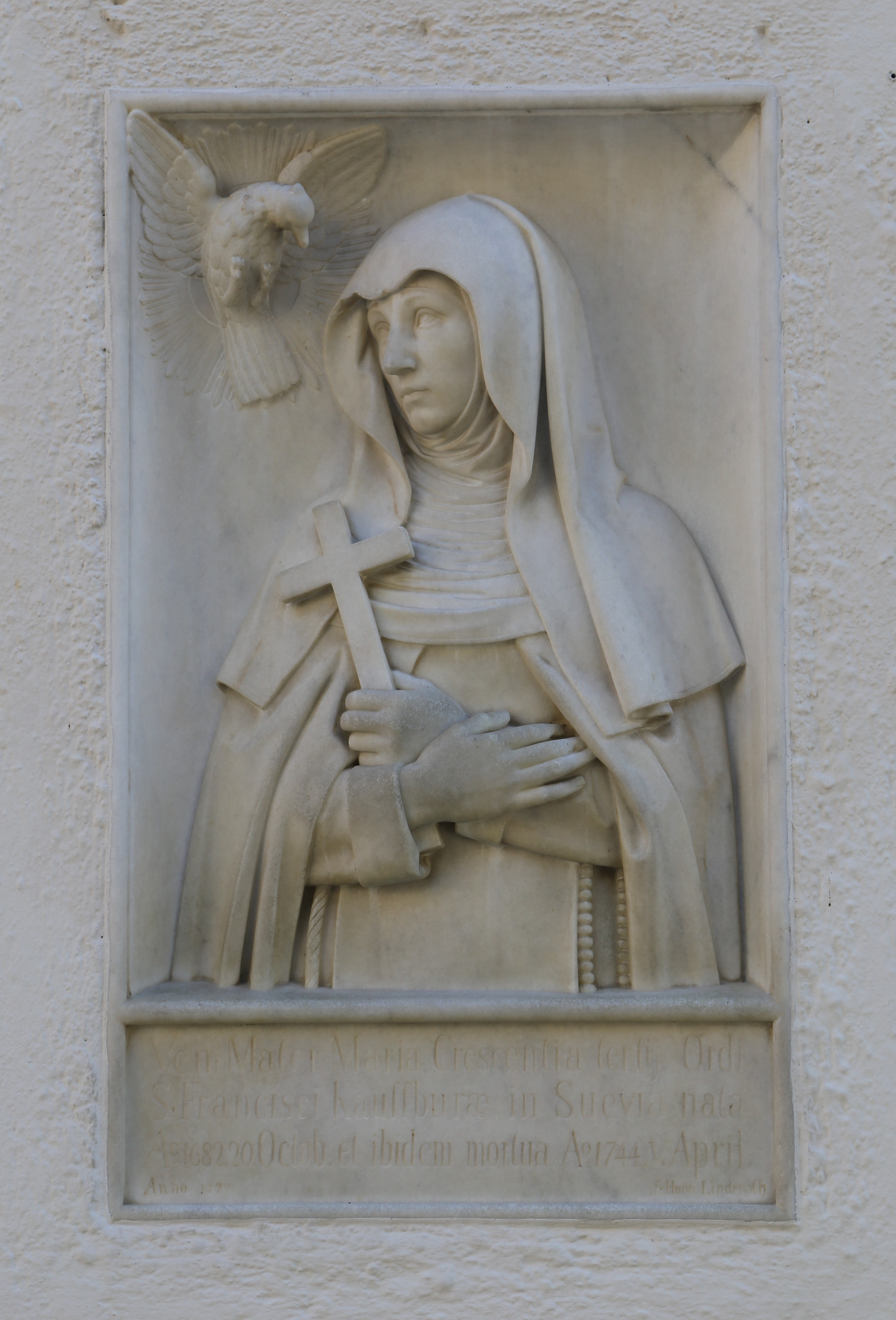 Crescentiaplatz 11, Kaufbeuren; Franziskanerinnenkloster St. Franziskus